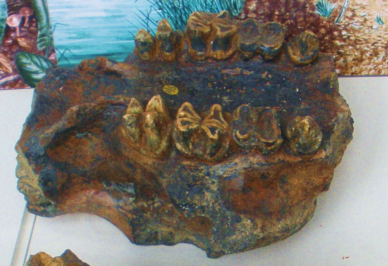 Fossil of Hippopotamus, an extinct mammal -- Took the photo at Natural History Museum, London